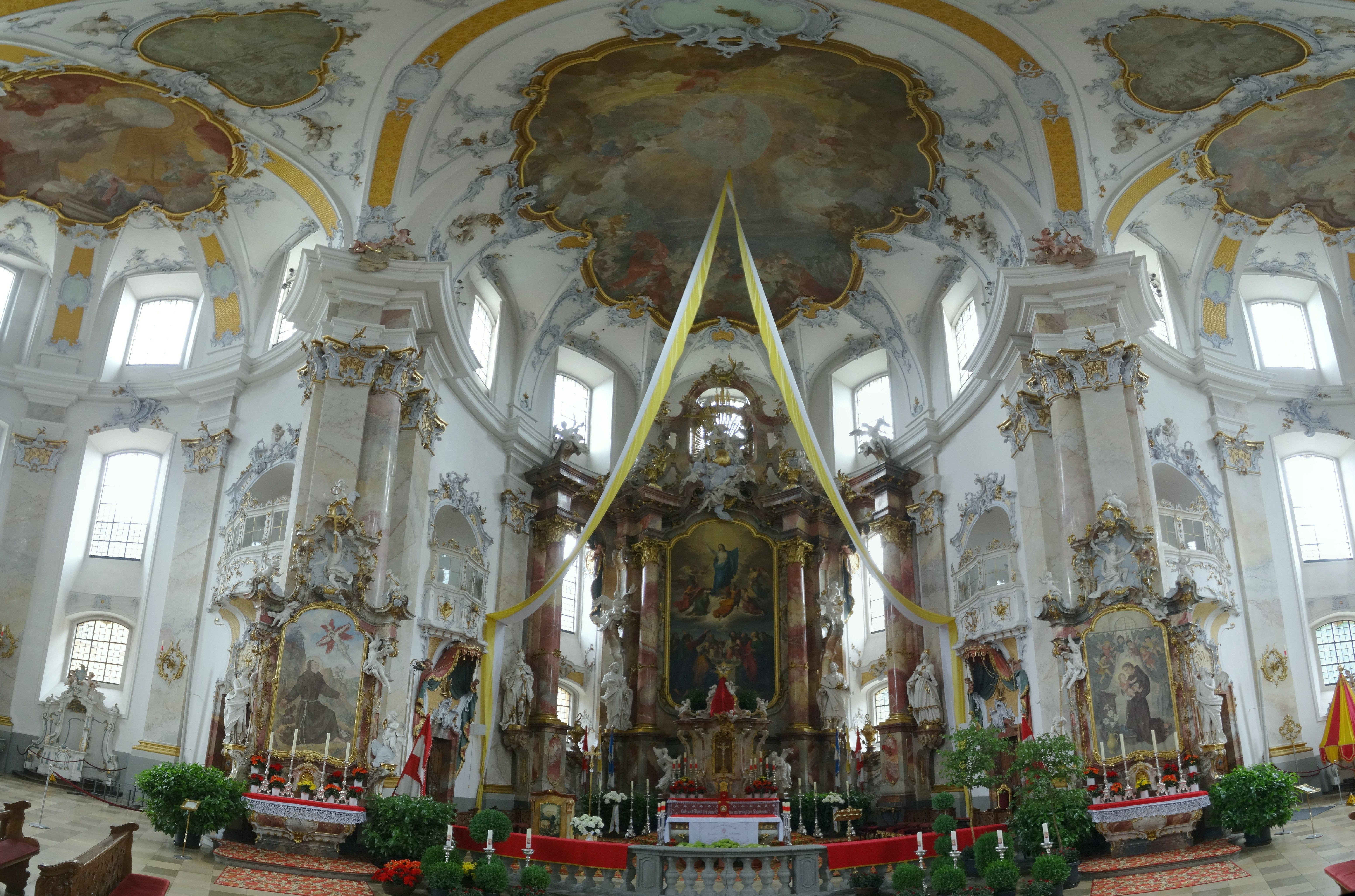 Basilika Vierzehnheiligen, Meisterwerk des fränkischen Barocks